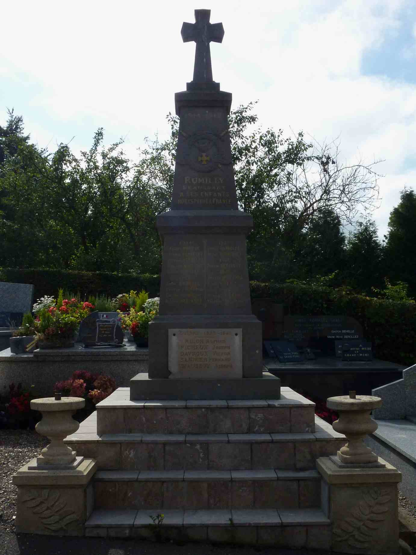 Monument aux morts de Rumilly-Beaussart